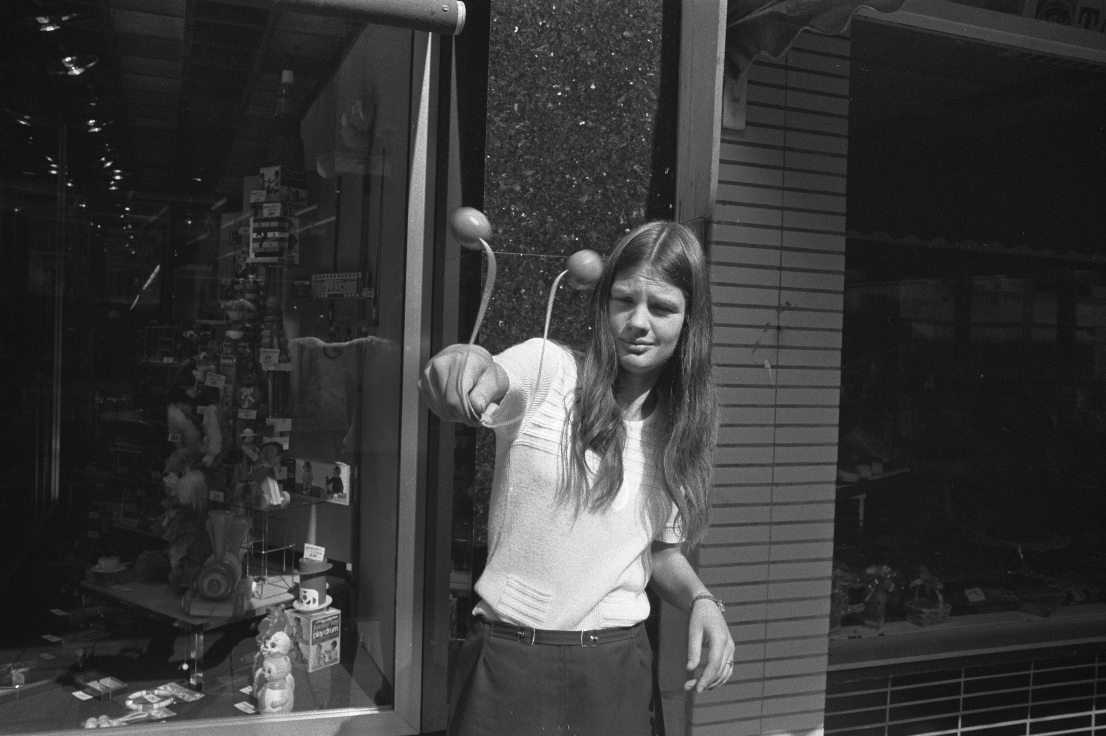 Collectie / Archief : Fotocollectie Anefo Reportage / Serie : [ onbekend ] Beschrijving : Mensen met een klik klak Amsterdam Datum : 20 augustus 1971 Locatie : Amsterdam, Noord-Holland Trefwoorden : speelgoed Fotograaf : Punt, […] / Anefo Auteursrechthebbende : Nationaal Archief Materiaalsoort : Negatief (zwart/wit) Nummer archiefinventaris : bekijk toegang 2.24.01.05 Bestanddeelnummer : 924-8383